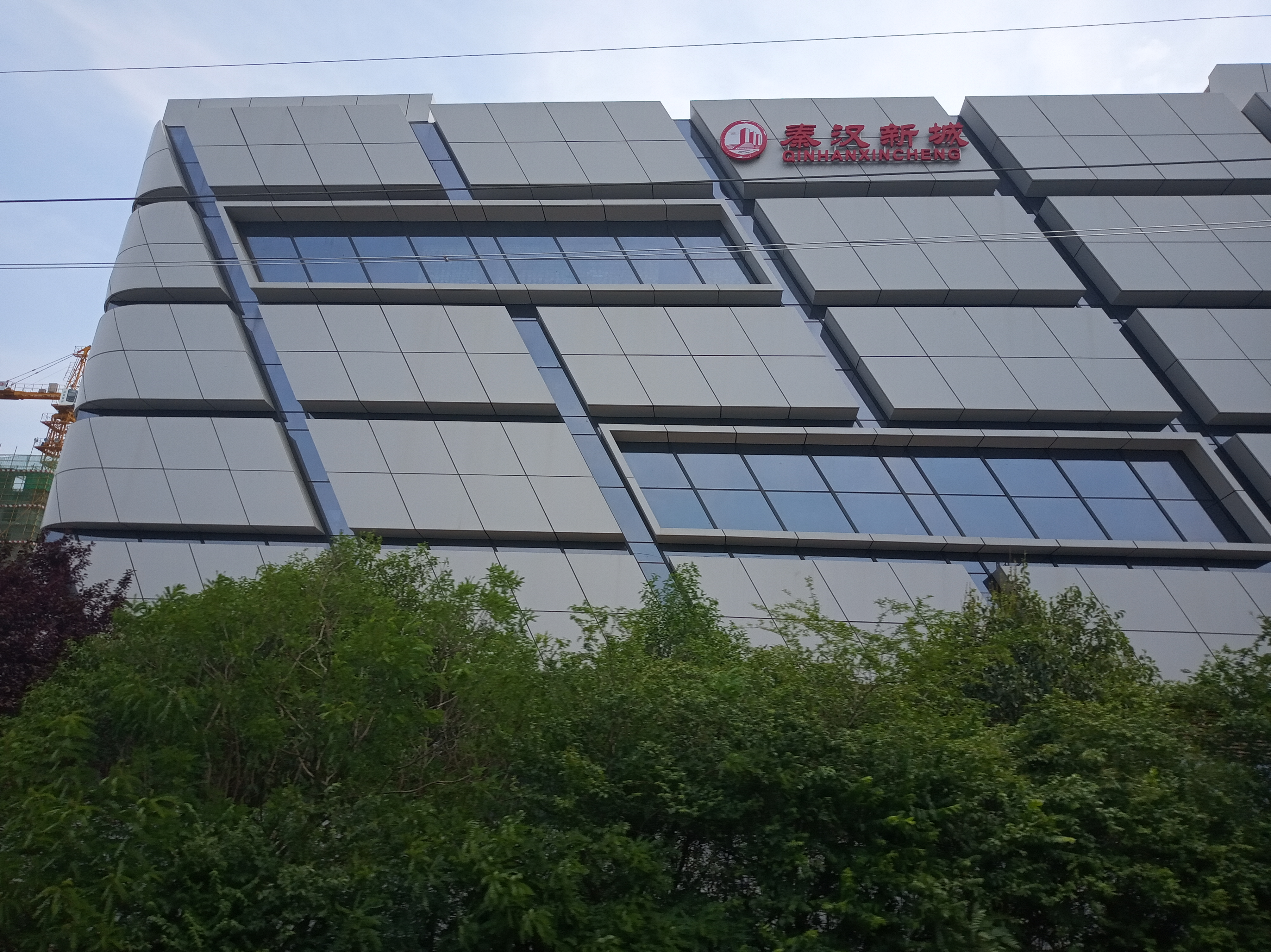 7001在咸阳市渭城区萧家村站和长陵站区间